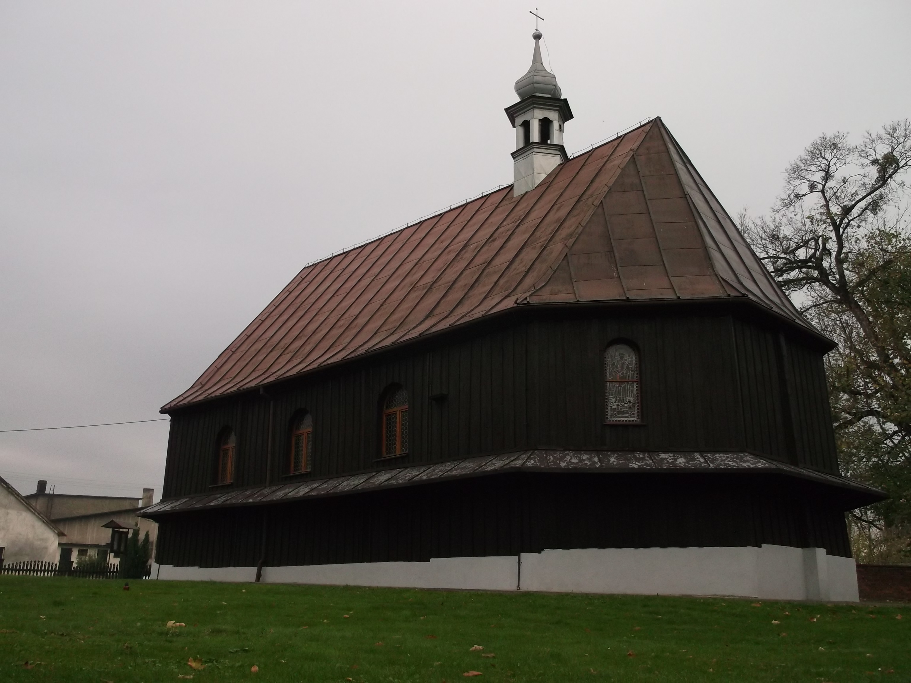 Kościół świętej Trójcy w Miejscu Odrzańskim